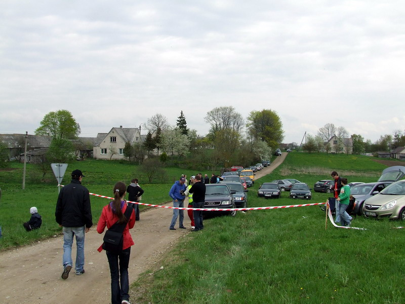 Bajorų kaime (Ukmergės raj.) vykstančios automobilių ralio varžybos.